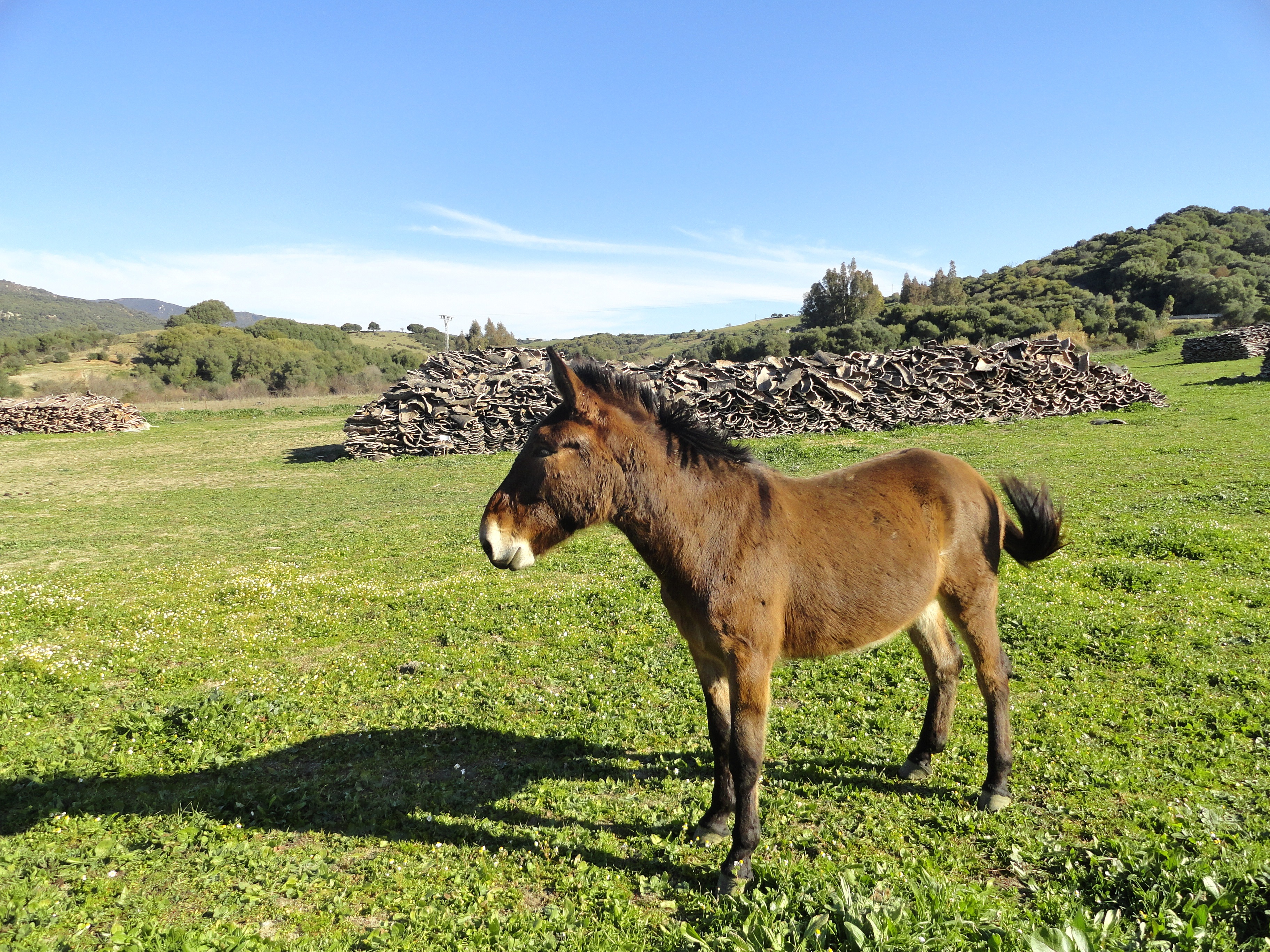 Maulesel, hinten gesammelte Stücke von Korkrinde in Südspanien